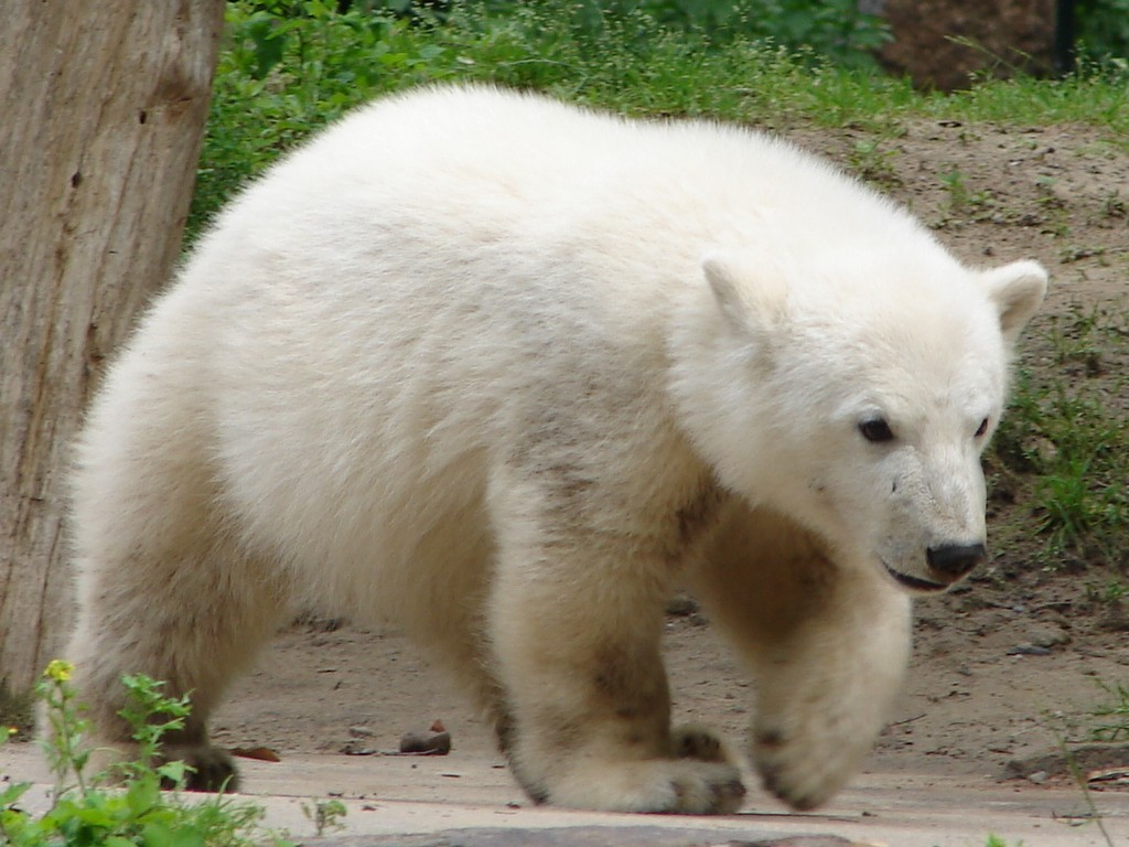 Eisbär Knut am 31. Mai 2007 im Zoologischen Garten Berlin